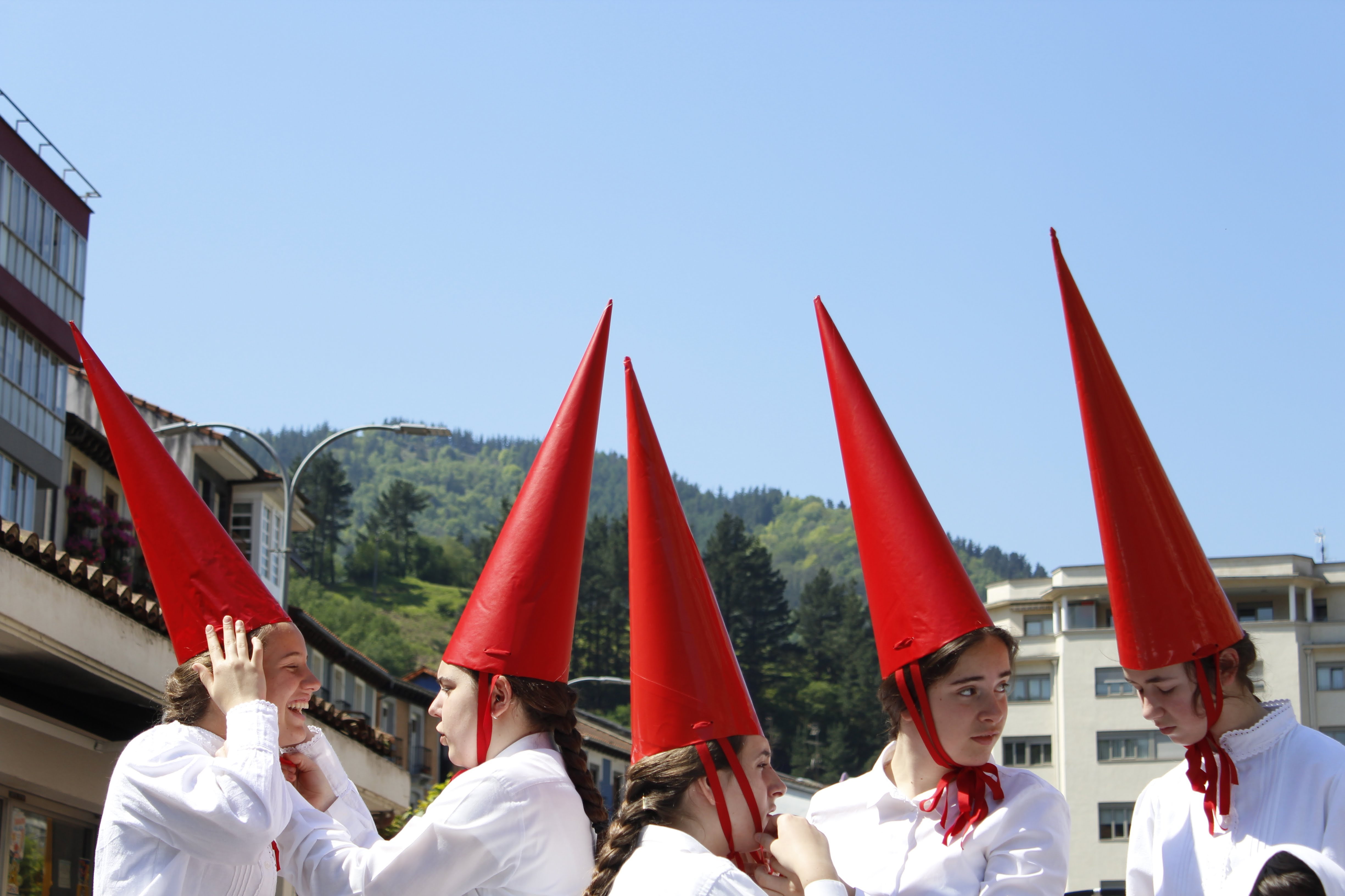 Oriako sorgin-dantzako dantzariak, Eibarren dantzaldi baterako prestatzen